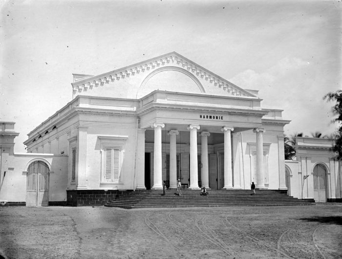 Negatief. Sociëteitsgebouw, Pasuruan, Oost-Java